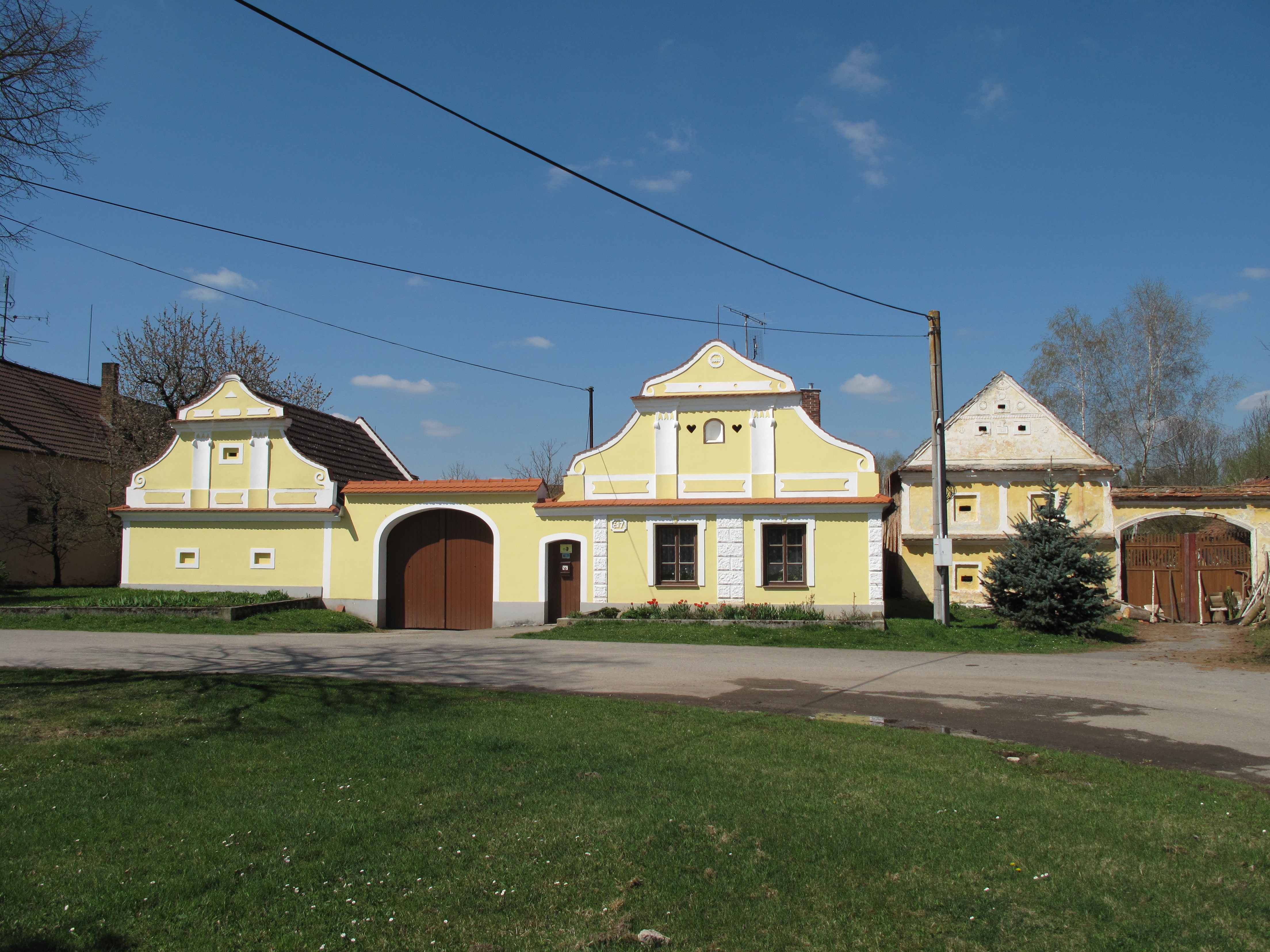 Statek v Pelejovicích. Okres České Budějovice, Česká republika.